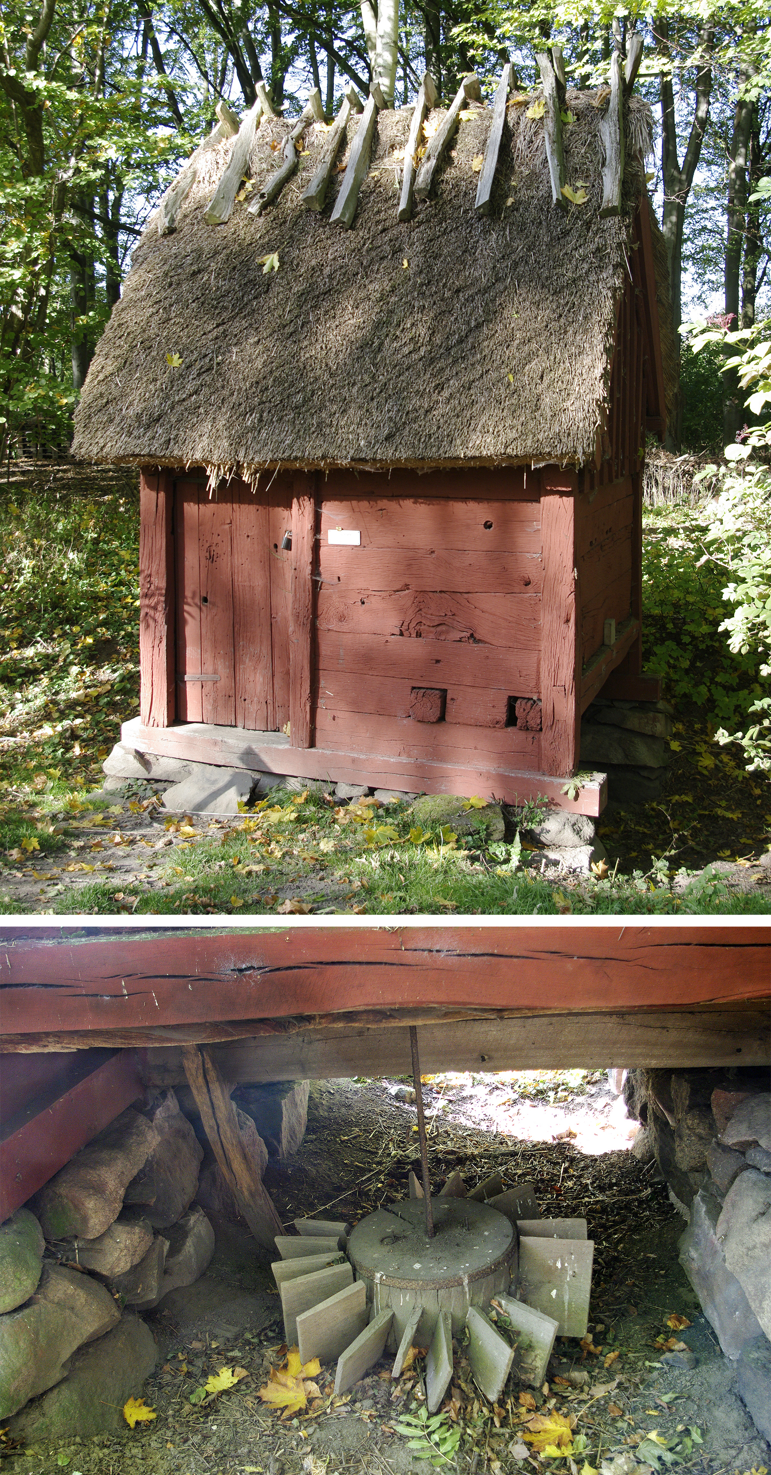 Skvaltkvarn på Fredriksdals museum, Helsingborg, Sweden.